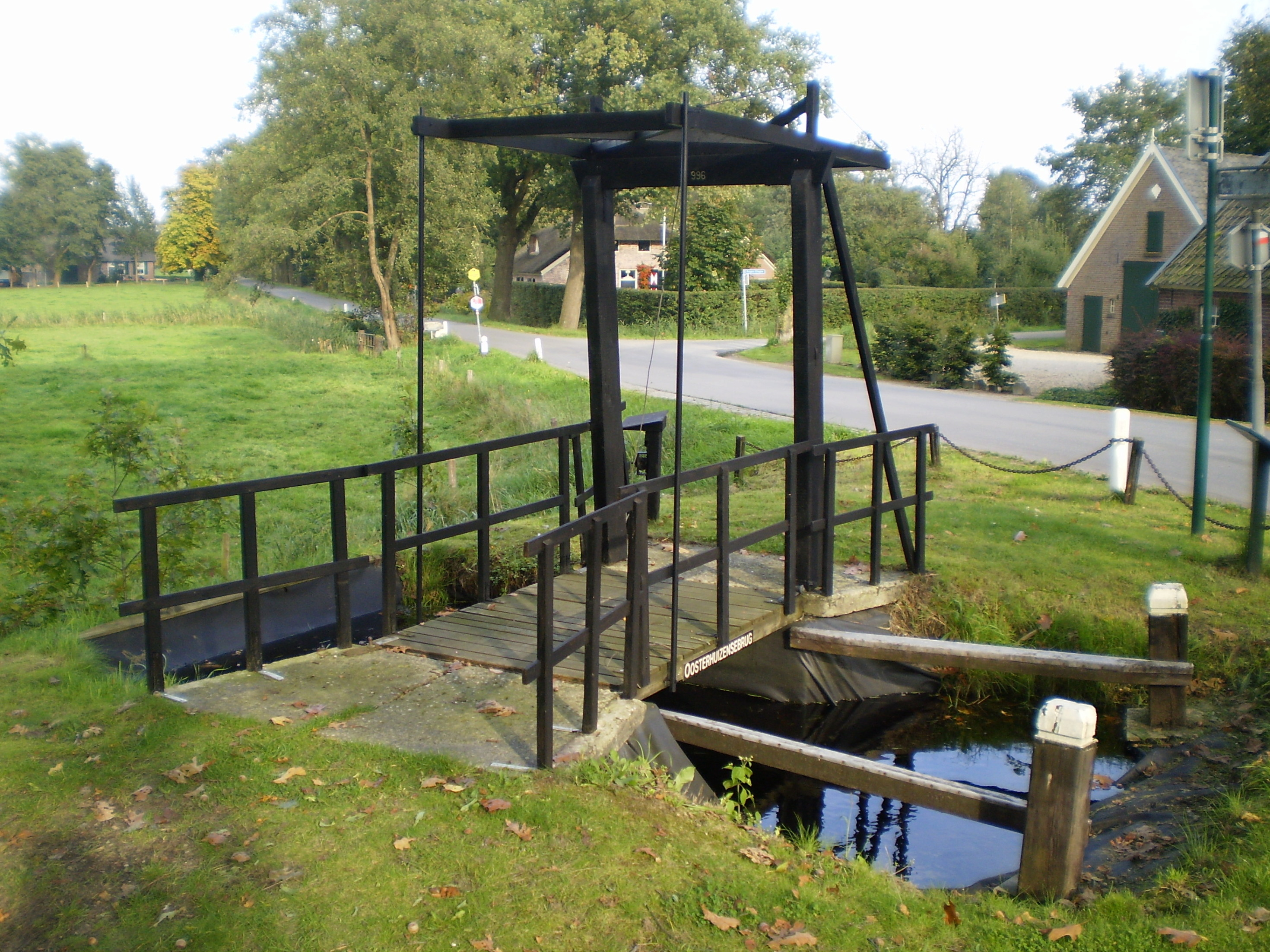 Replica van de 'Oosterhuizense brug' (in 1978 vervangen door huidige 'Oosterhuizerbrug') over het Apeldoorns Kanaal